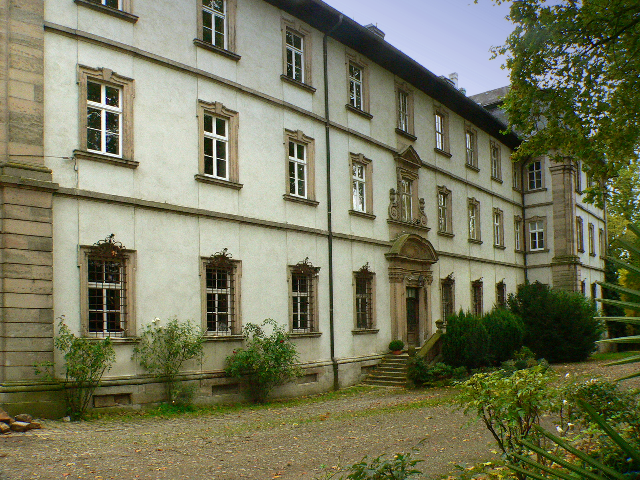 Kloster Obertheres, ehem. Konventbau